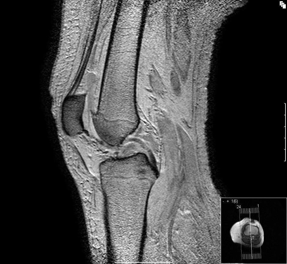 Bildbeschreibung: Gonarthrose, seitliches Bild Quelle: eigene Aufnahme Datum: Autor: User:Scuba-limp